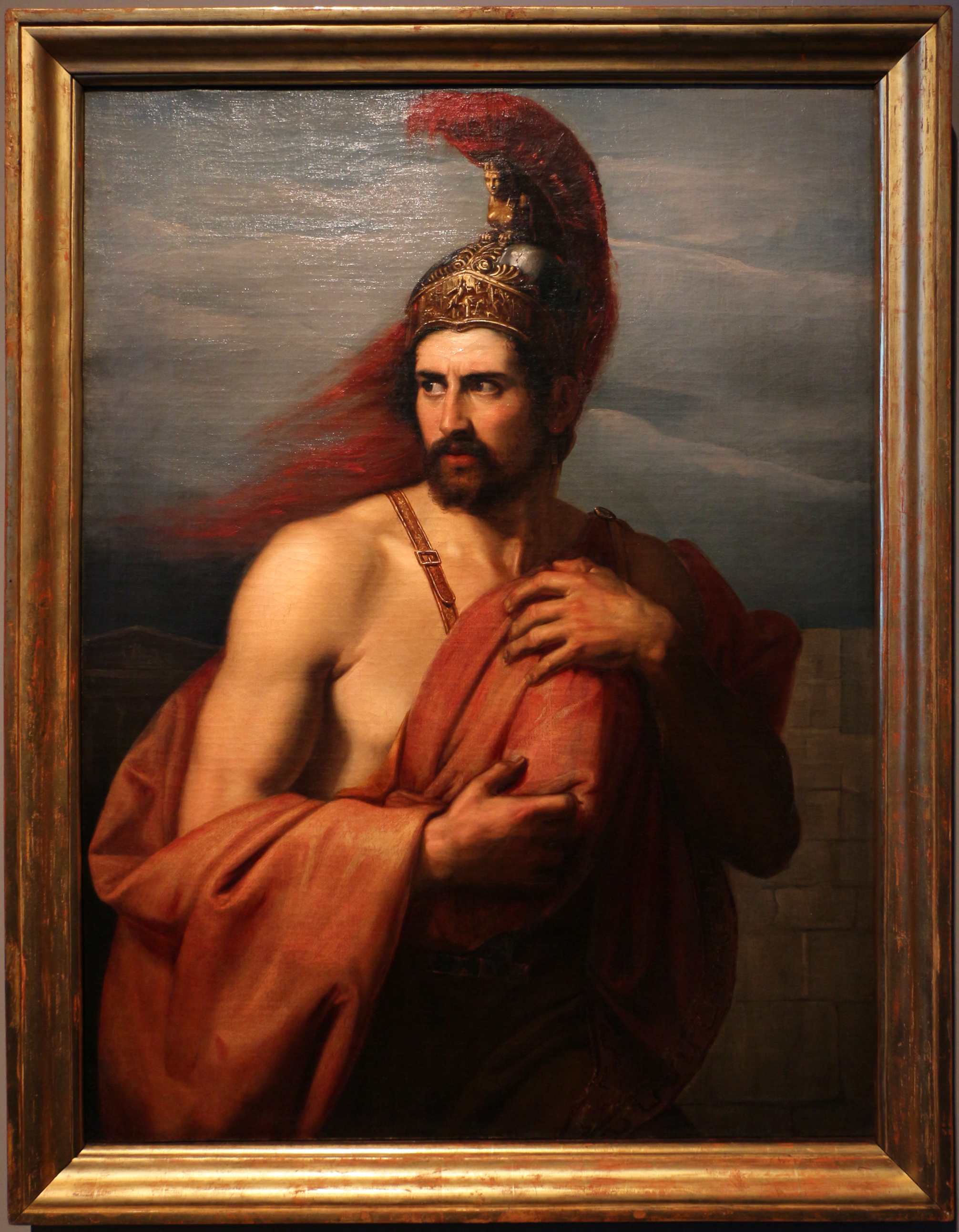 Gallerie dell'Accademia This is a photo of a monument which is part of cultural heritage of Italy.